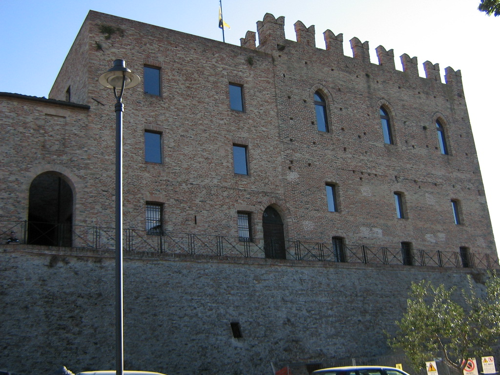 Castello malatestiano, Mondaino (RN), Italy